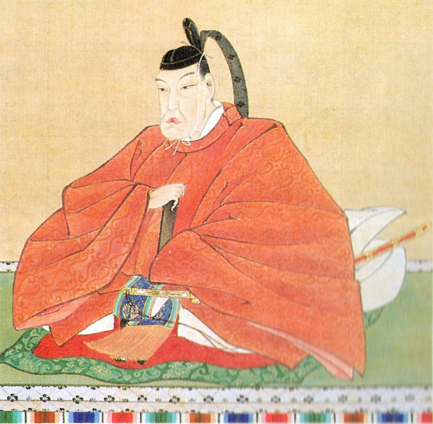 鍋島直郷の肖像。